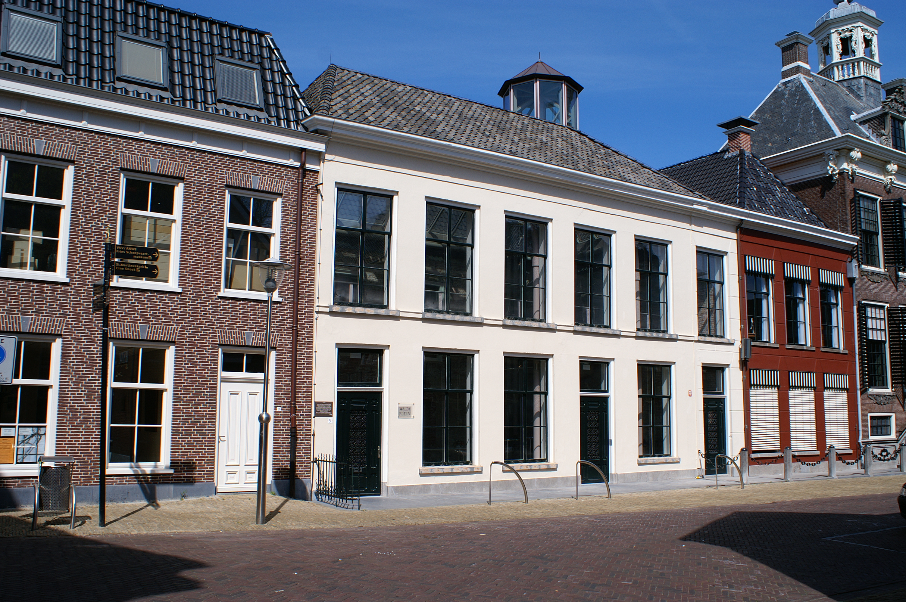 Het Waltahuis te Sneek.